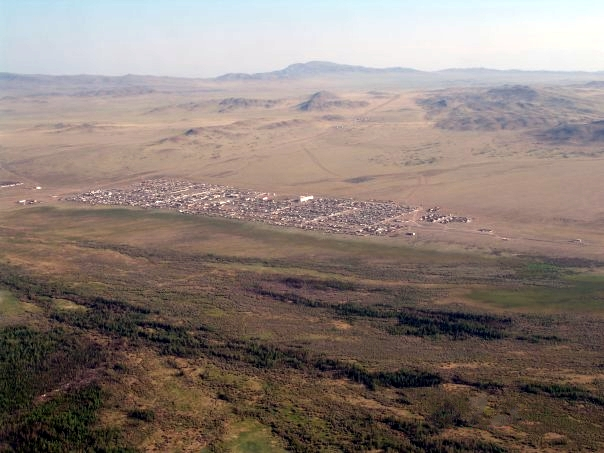 Хандагайты с высоты птичьего полёта